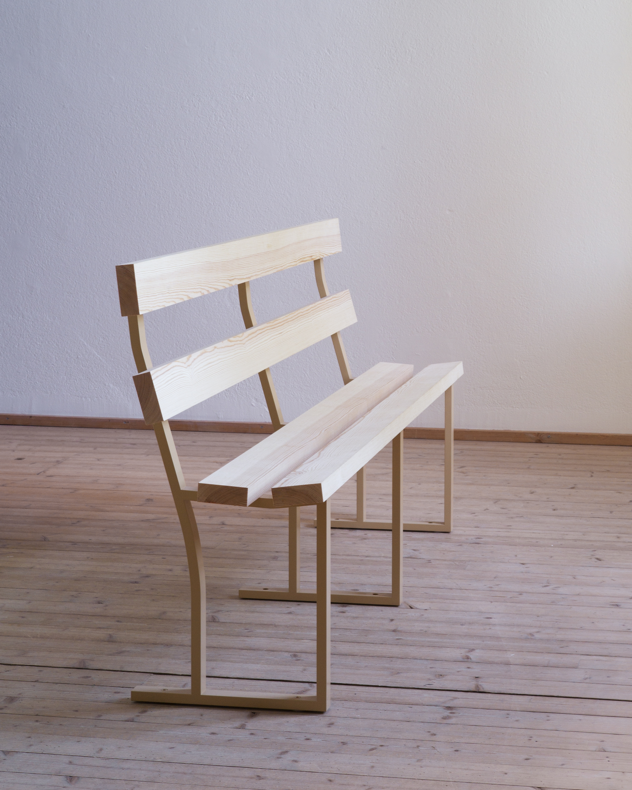 Parkbänk, utställningsobjekt, ArkDes